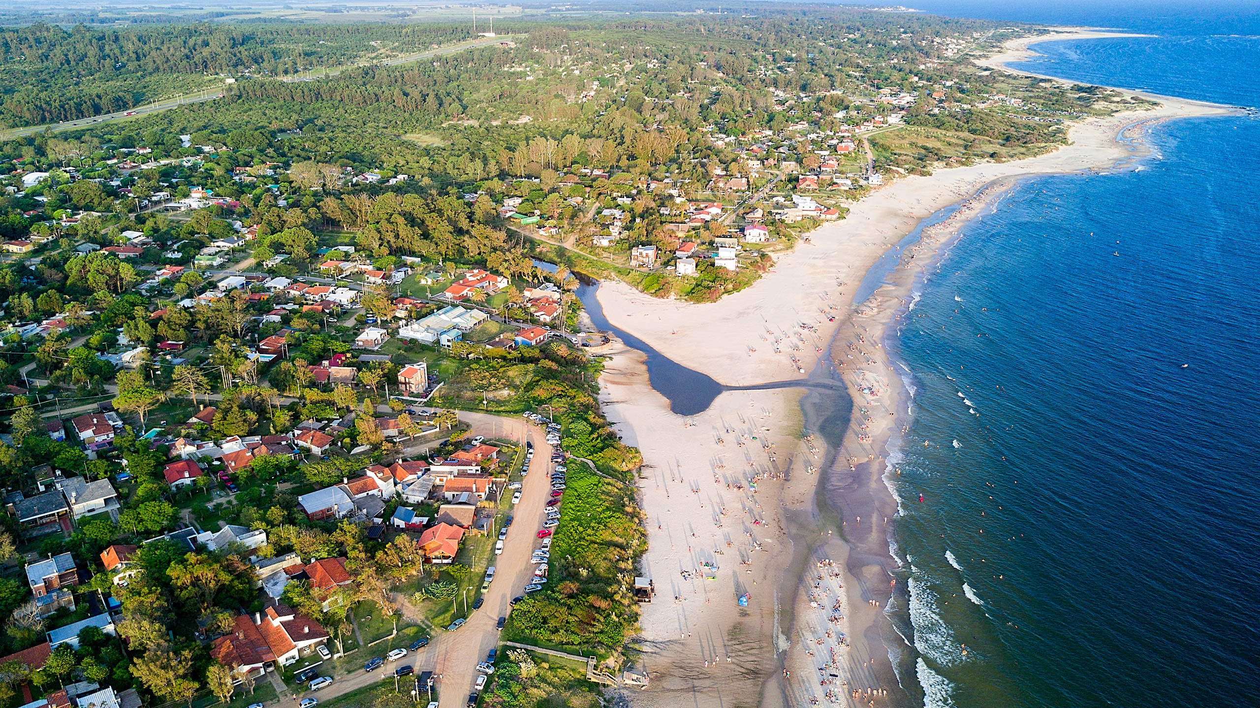 Vista aérea del balneario Los Titanes, Canelones, Uruguay.